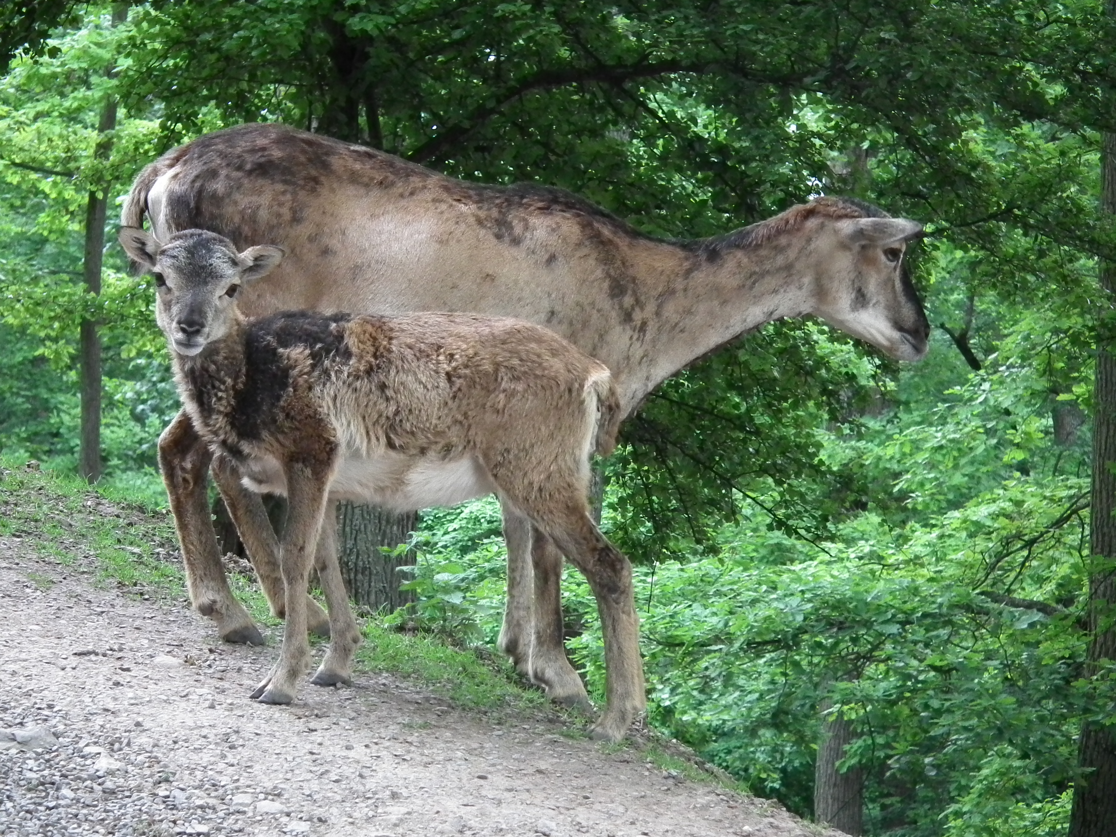 Europäisches Mufflon (Ovis orientalis musimon) mit Jungtier im Wildpark Tripsdrill (Baden-Württemberg, Deutschland)